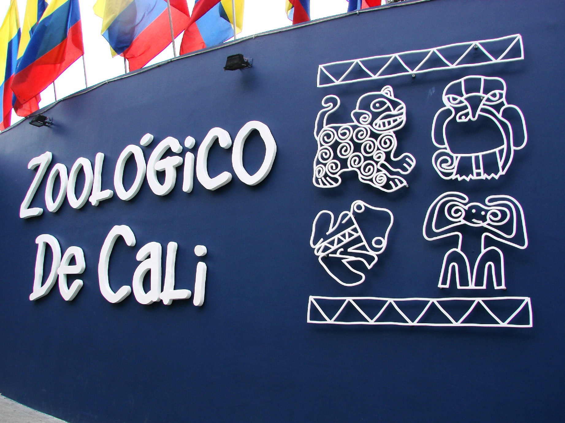 Zoologico de Cali